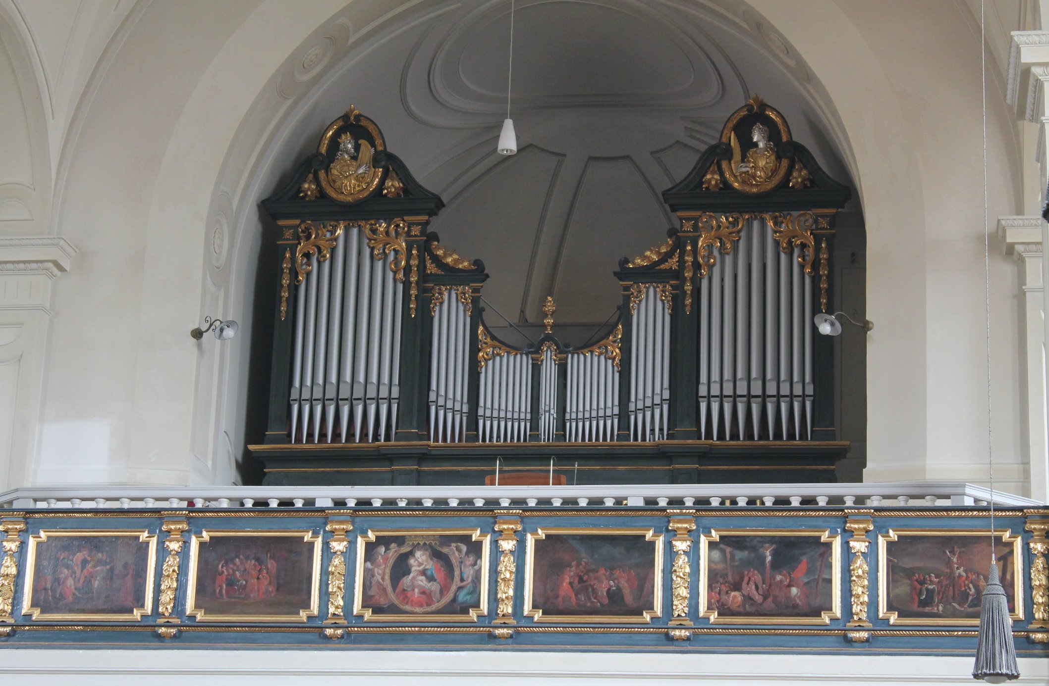 Orgel von St. Walburga in Beilngries (1913, J. Bittner, III/42)